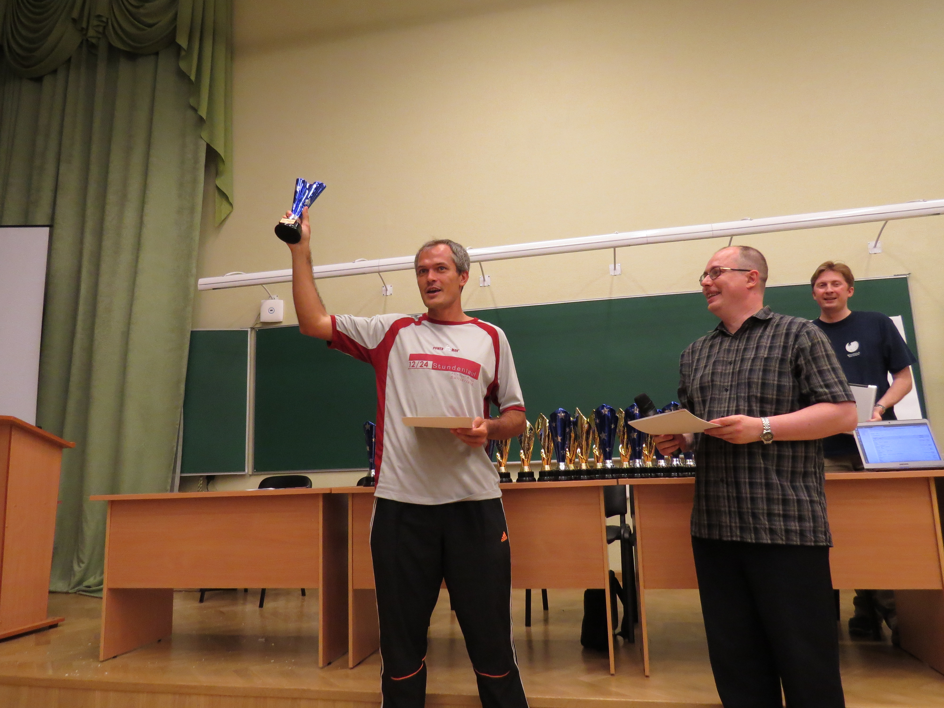 Wiki Party in Moscow 2013-05-18